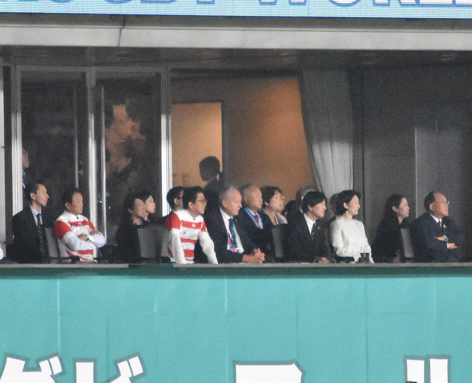 ラグビーワールカップ2019